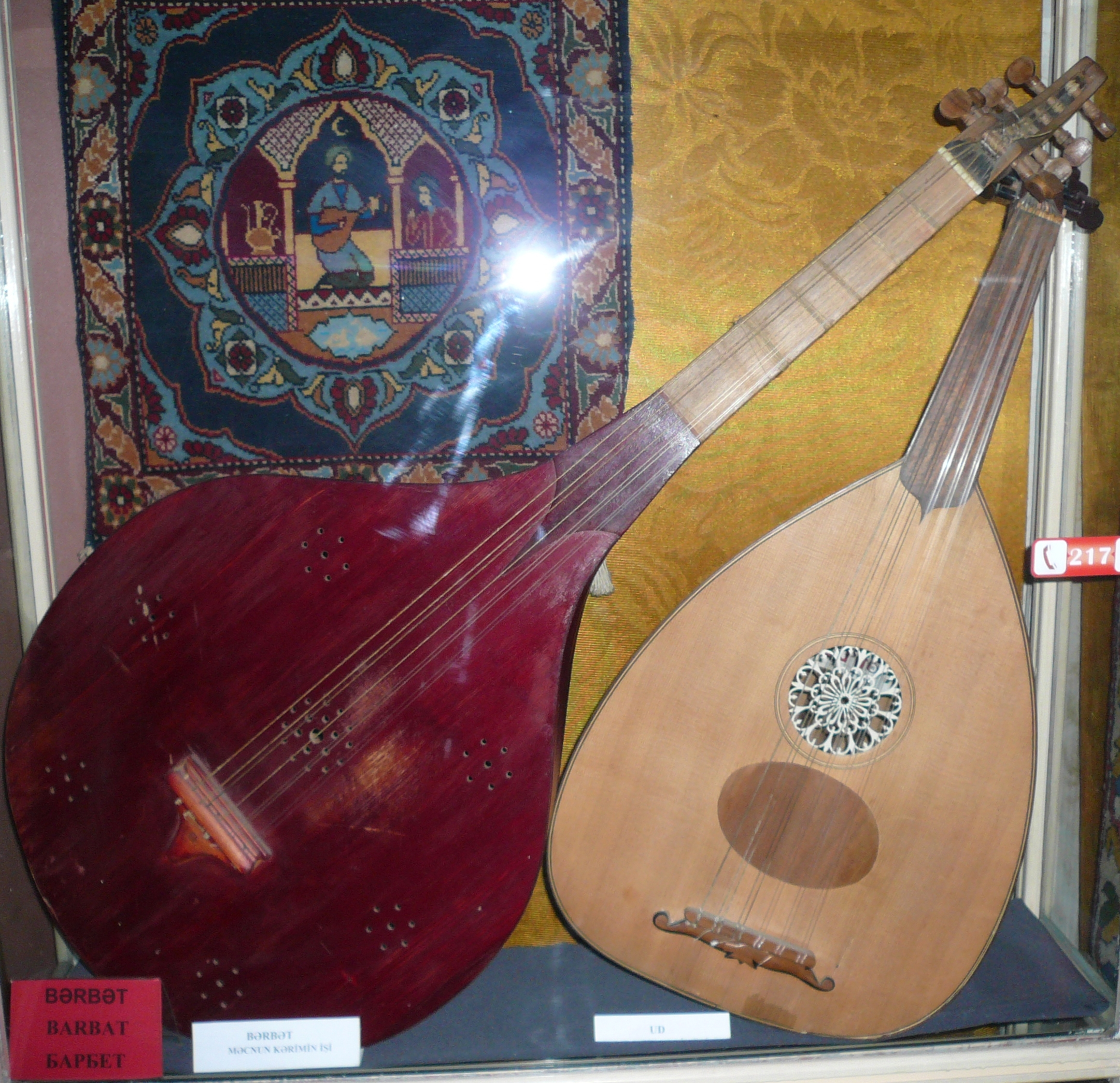 Барбет. Музей музыкальный инструментов. Баку, Азербайджан